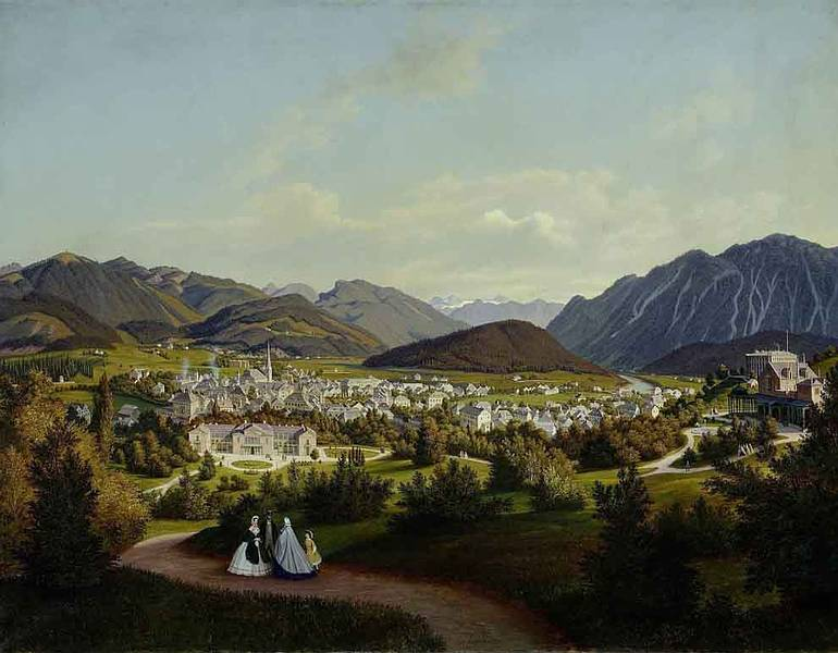 Ischl, aufgenommen von dem Lusthaus im Garten der kaiserlichen Villa am Jainzen, im Norden der Stadt gelegentitle QS:P1476,de:"Ischl, aufgenommen von dem Lusthaus im Garten der kaiserlichen Villa am Jainzen, im Norden der Stadt gelegen" label QS:Lde,"Ischl, aufgenommen von dem Lusthaus im Garten der kaiserlichen Villa am Jainzen, im Norden der Stadt gelegen"